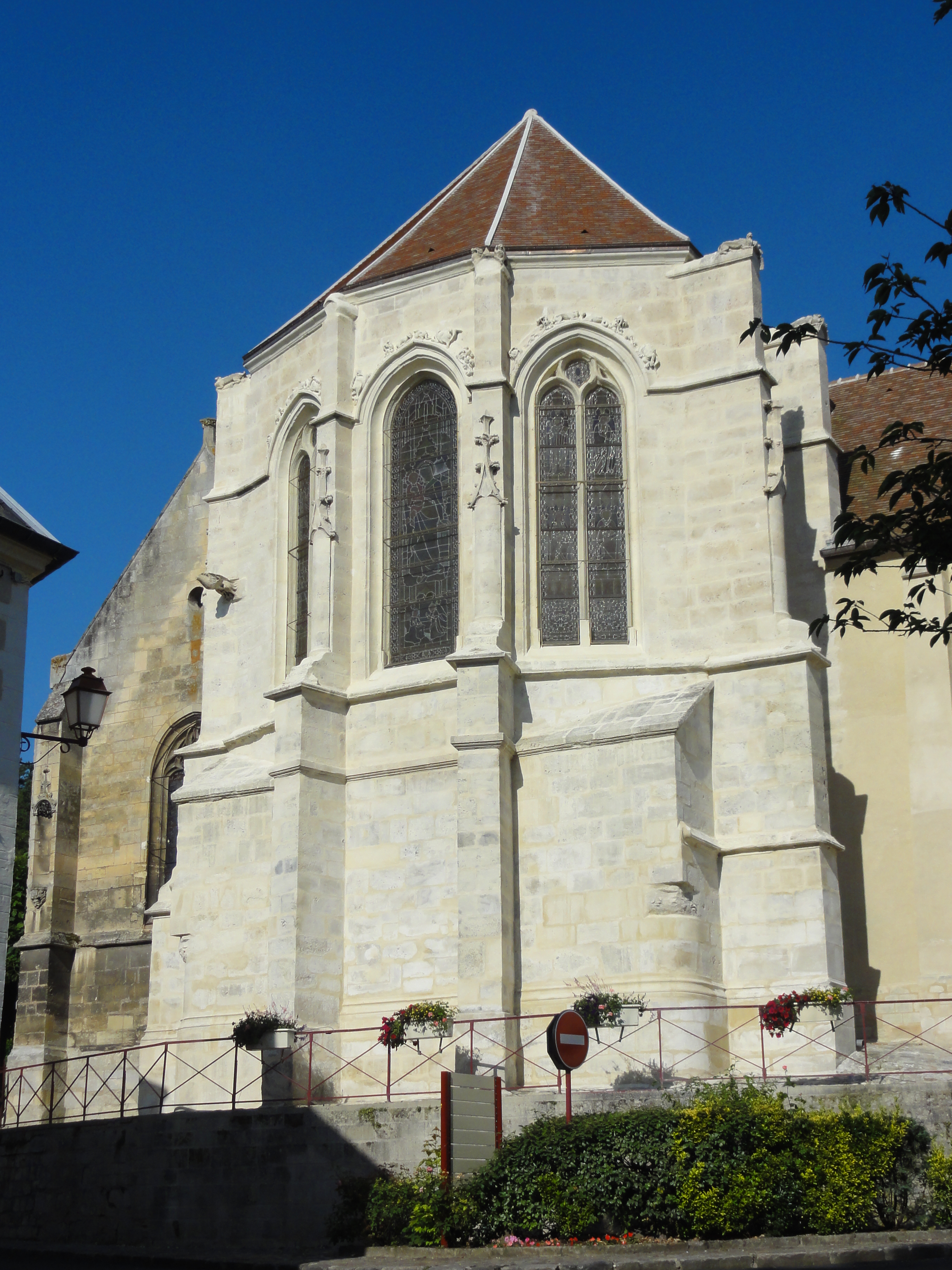 Chevet.